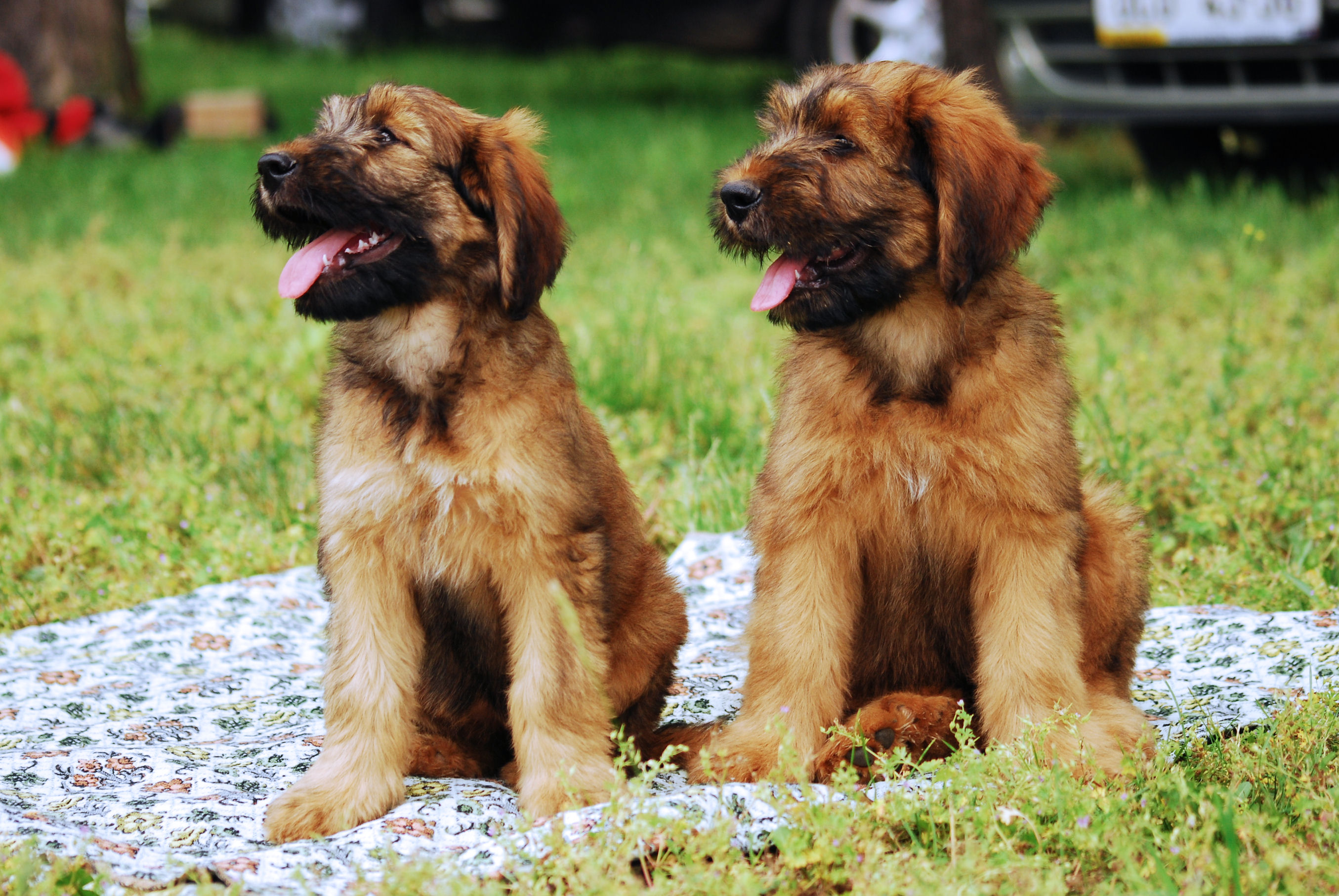 Briard dog show in Racibórz